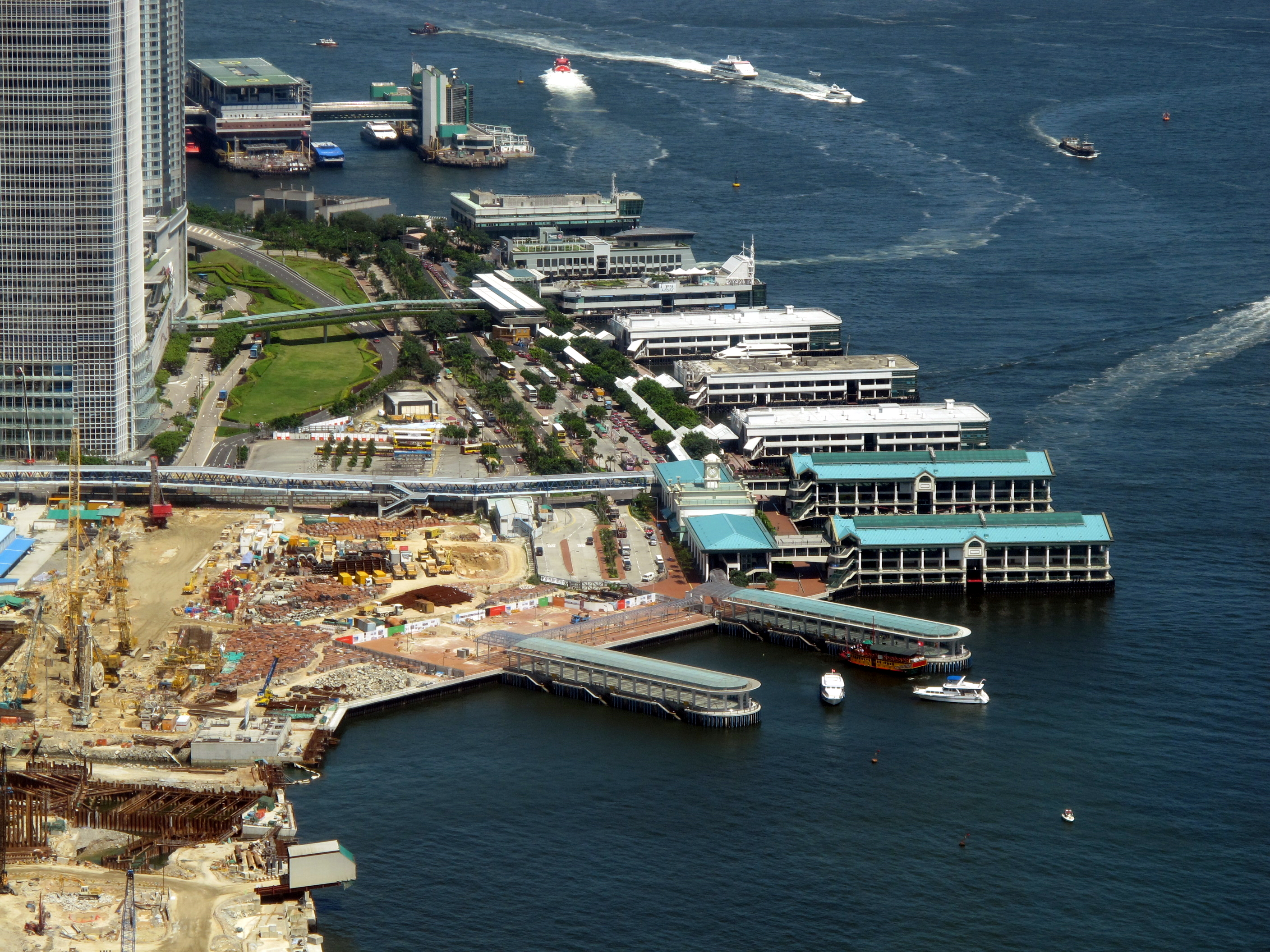 Central Piers 中環渡輪碼頭